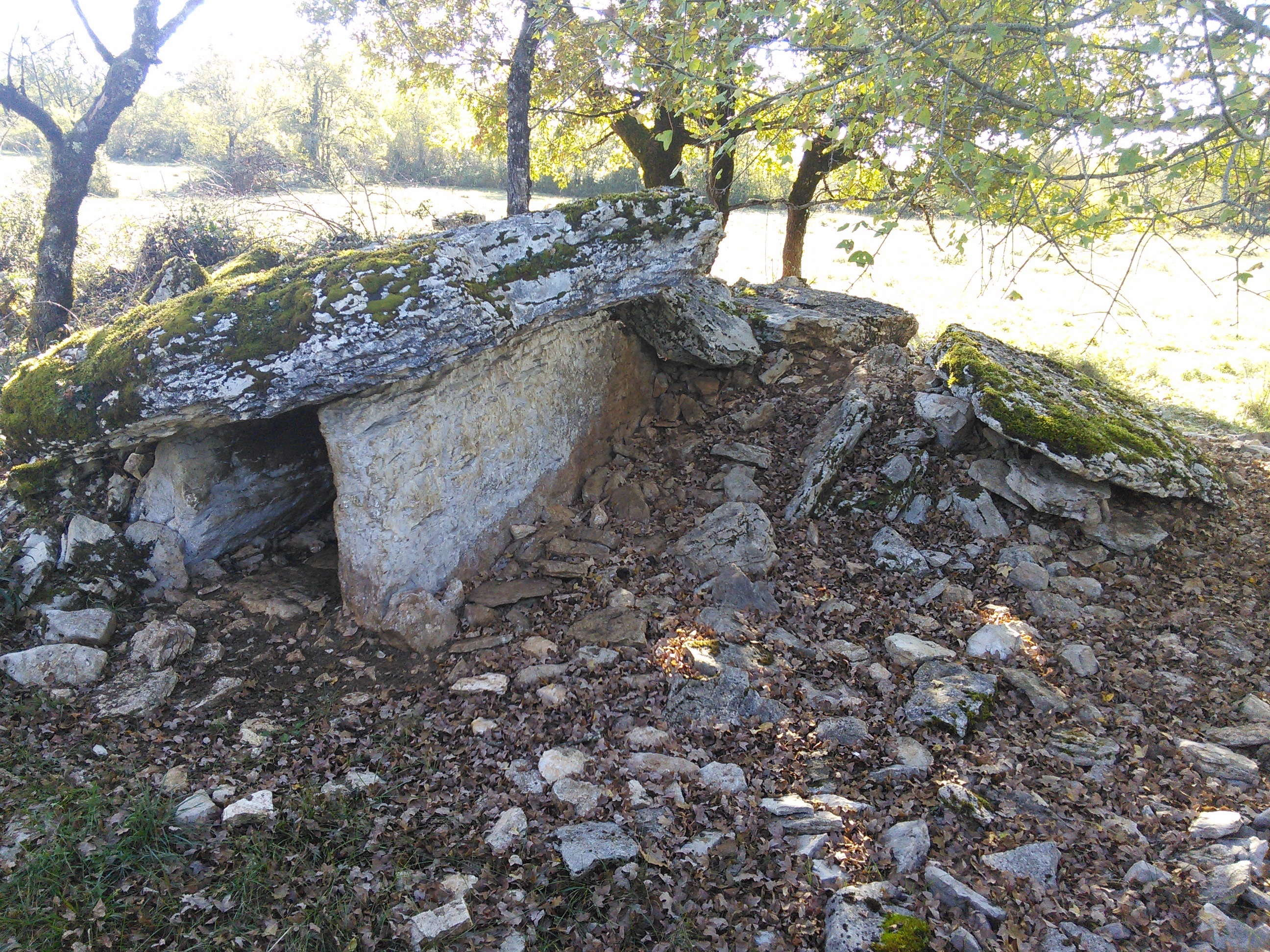 a